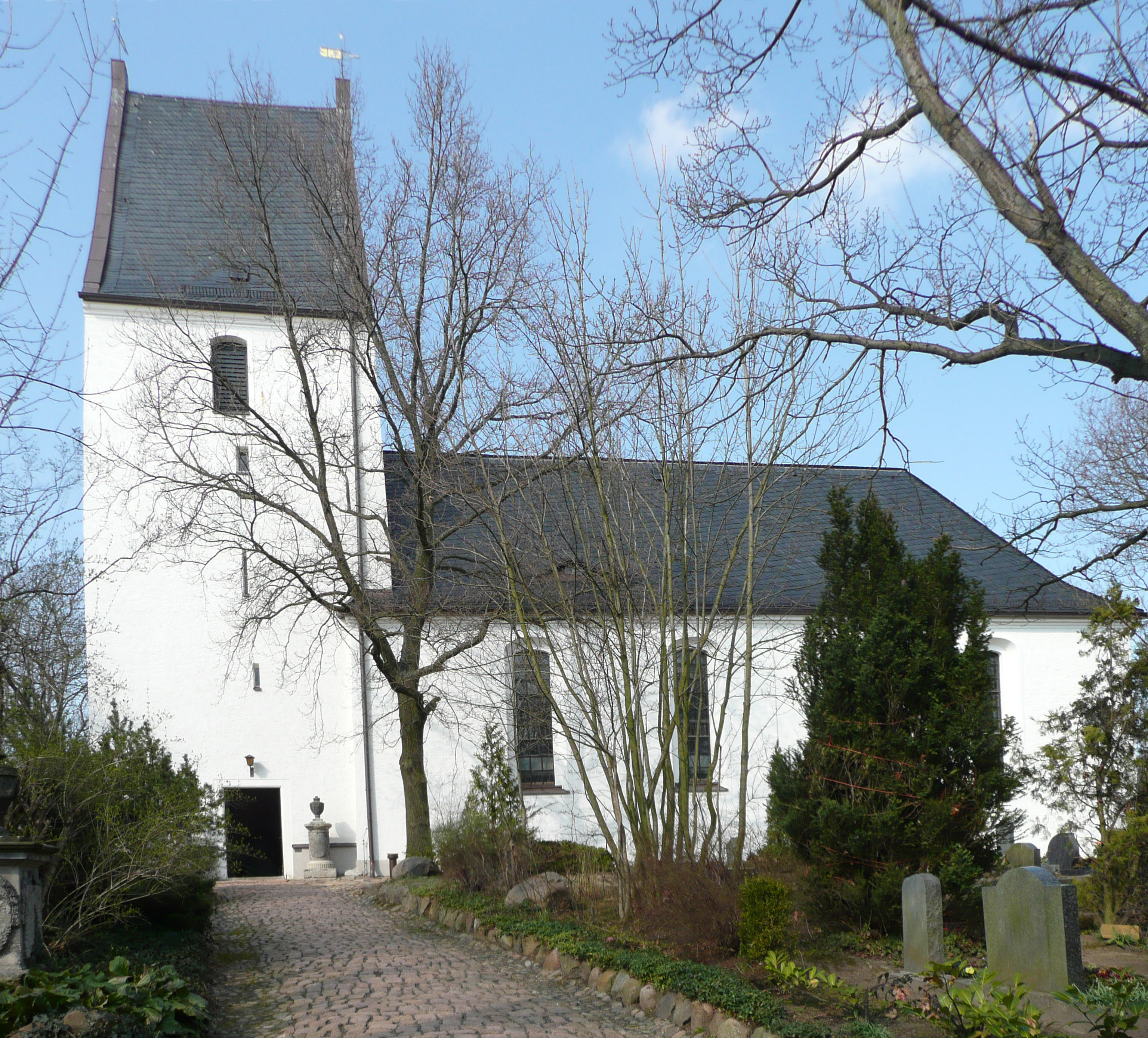 Die Kirche in Panitzsch bei Leipzig, von Süden gesehen